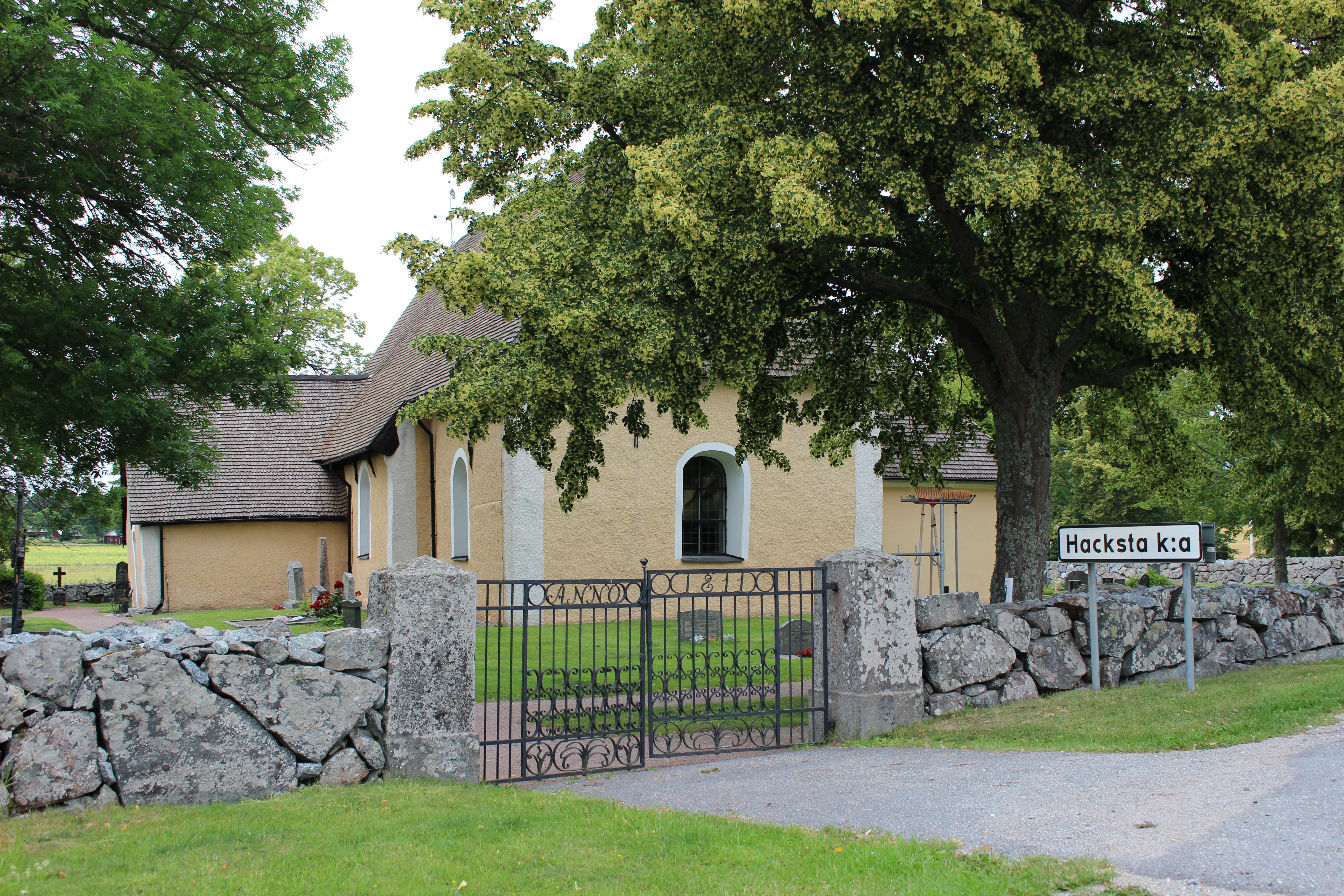 Hacksta kyrka från öster.